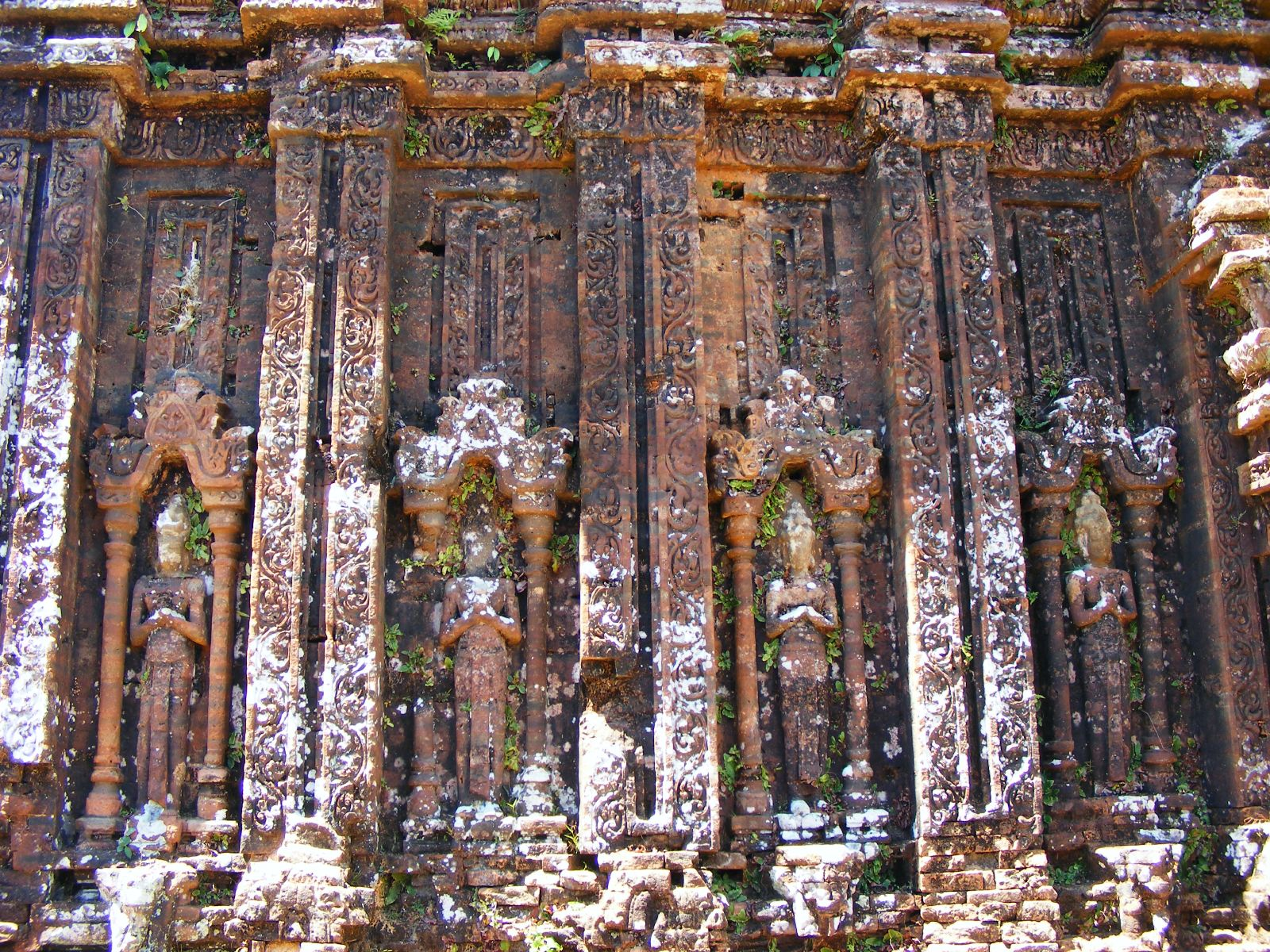 My Son temple detail.